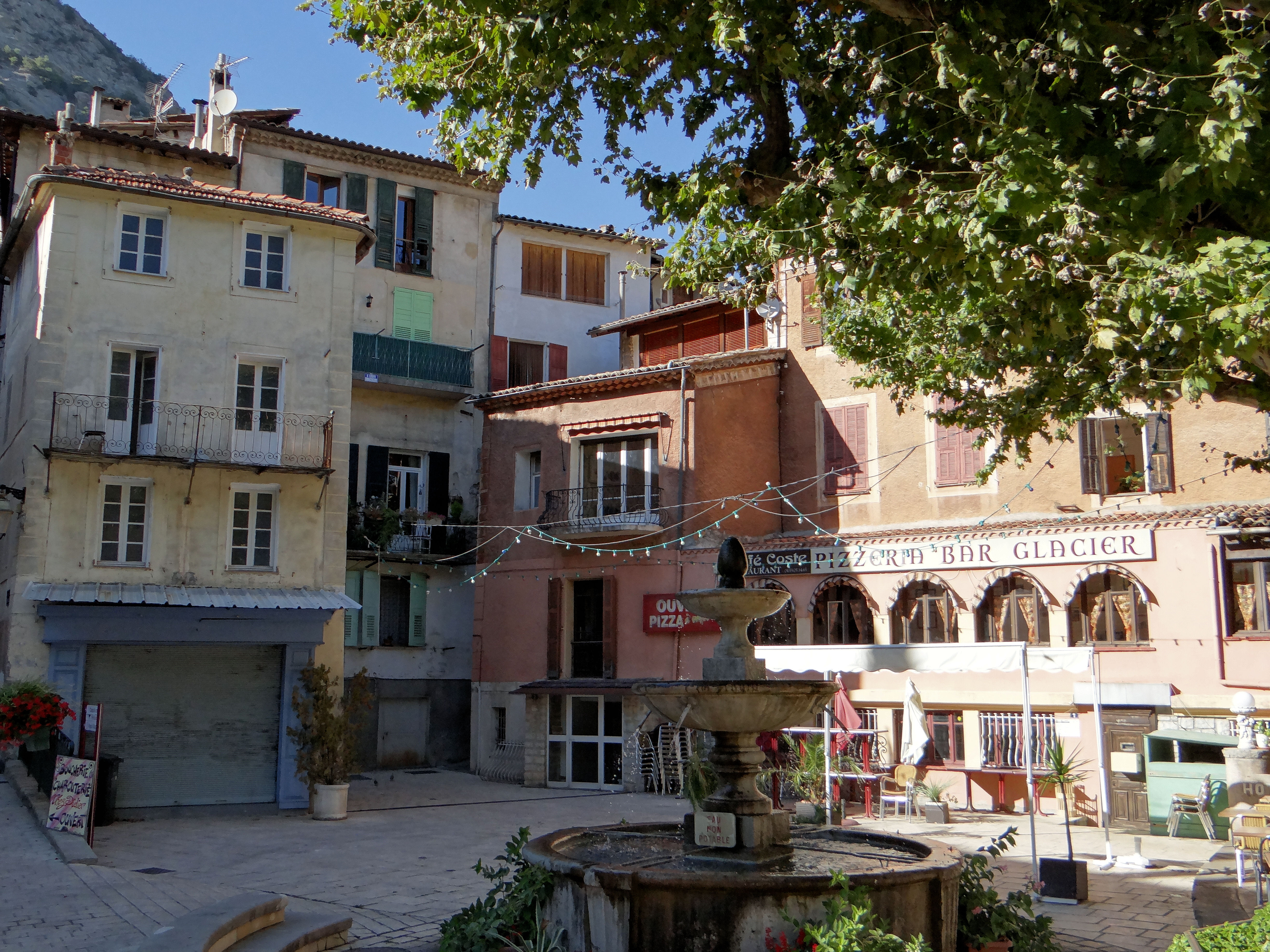 Puget-Théniers - Place Adolphe-Conil